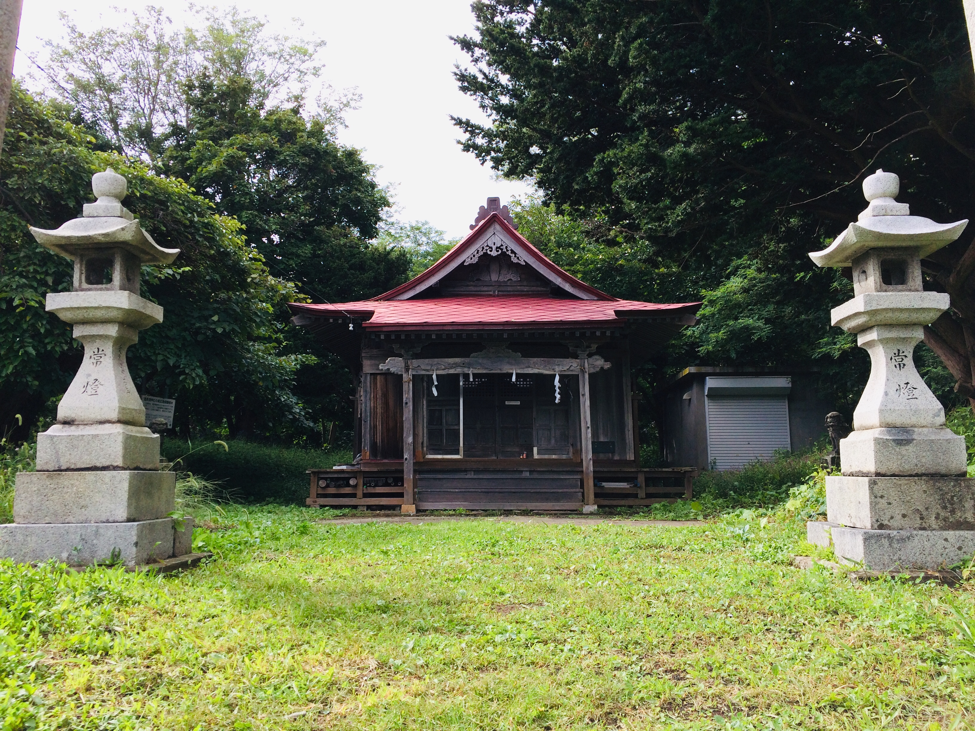 恵美須神社本殿、北海道小樽市祝津3丁目にて撮影。